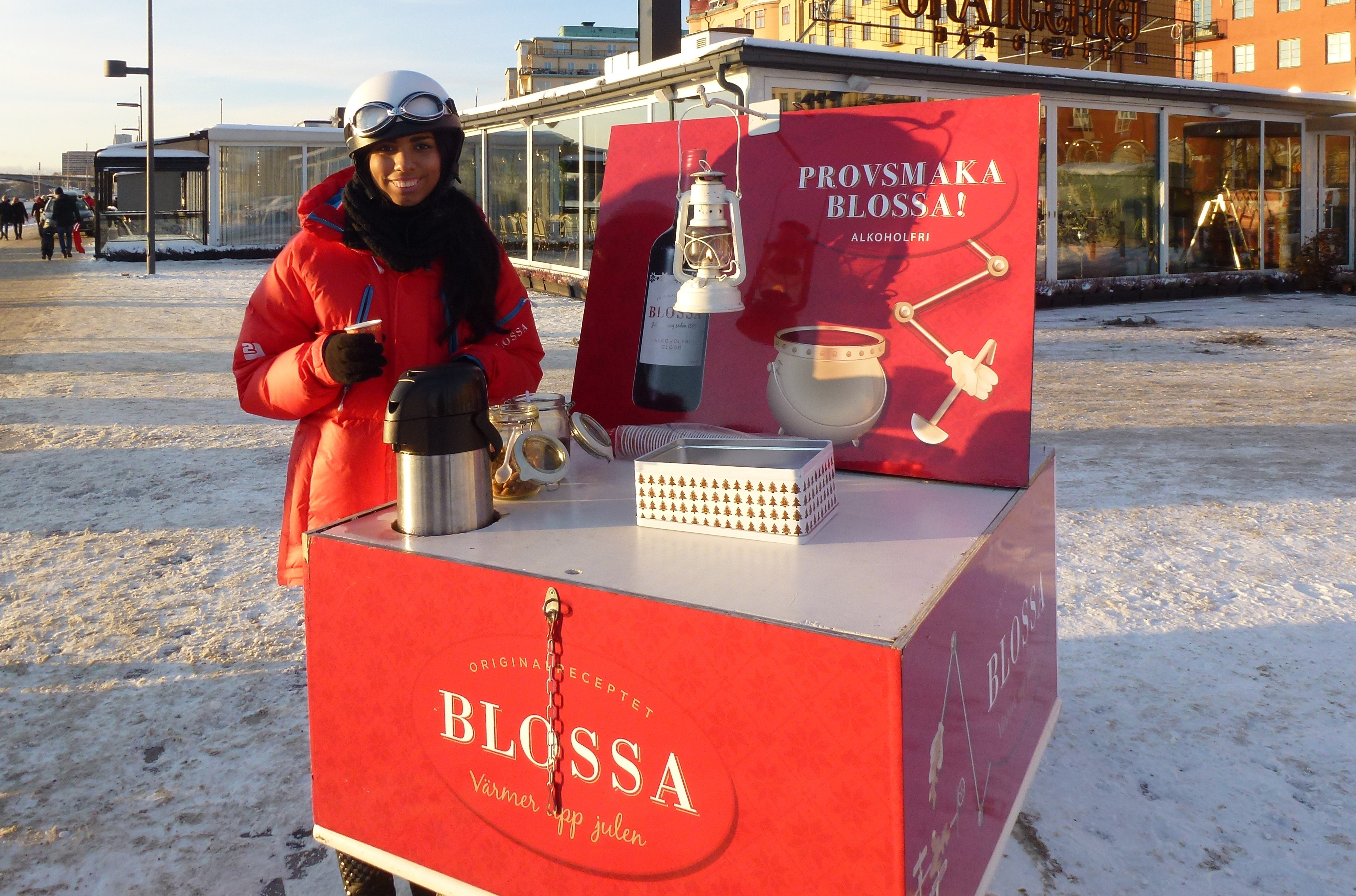 Alkoholfri Blossa bjuds på Norr Mälarstrand, 1. Advent 2012